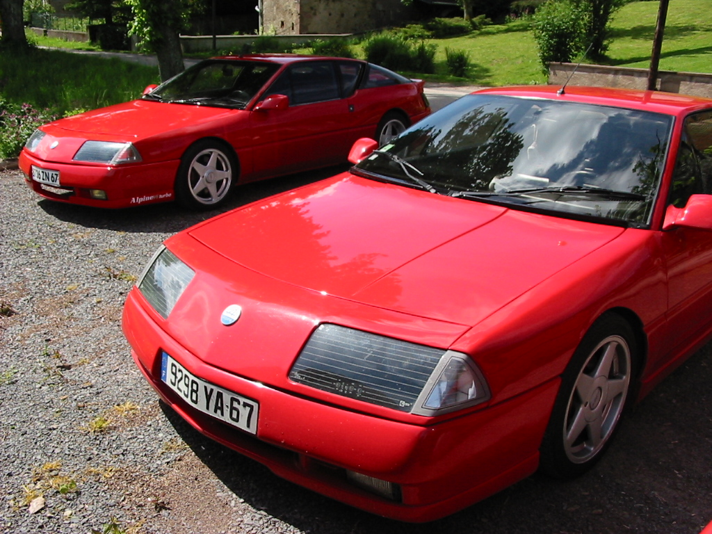 Renault Alpine GTA V6 Turbo Auteur : Christian Amet, le 4 juin 2006.